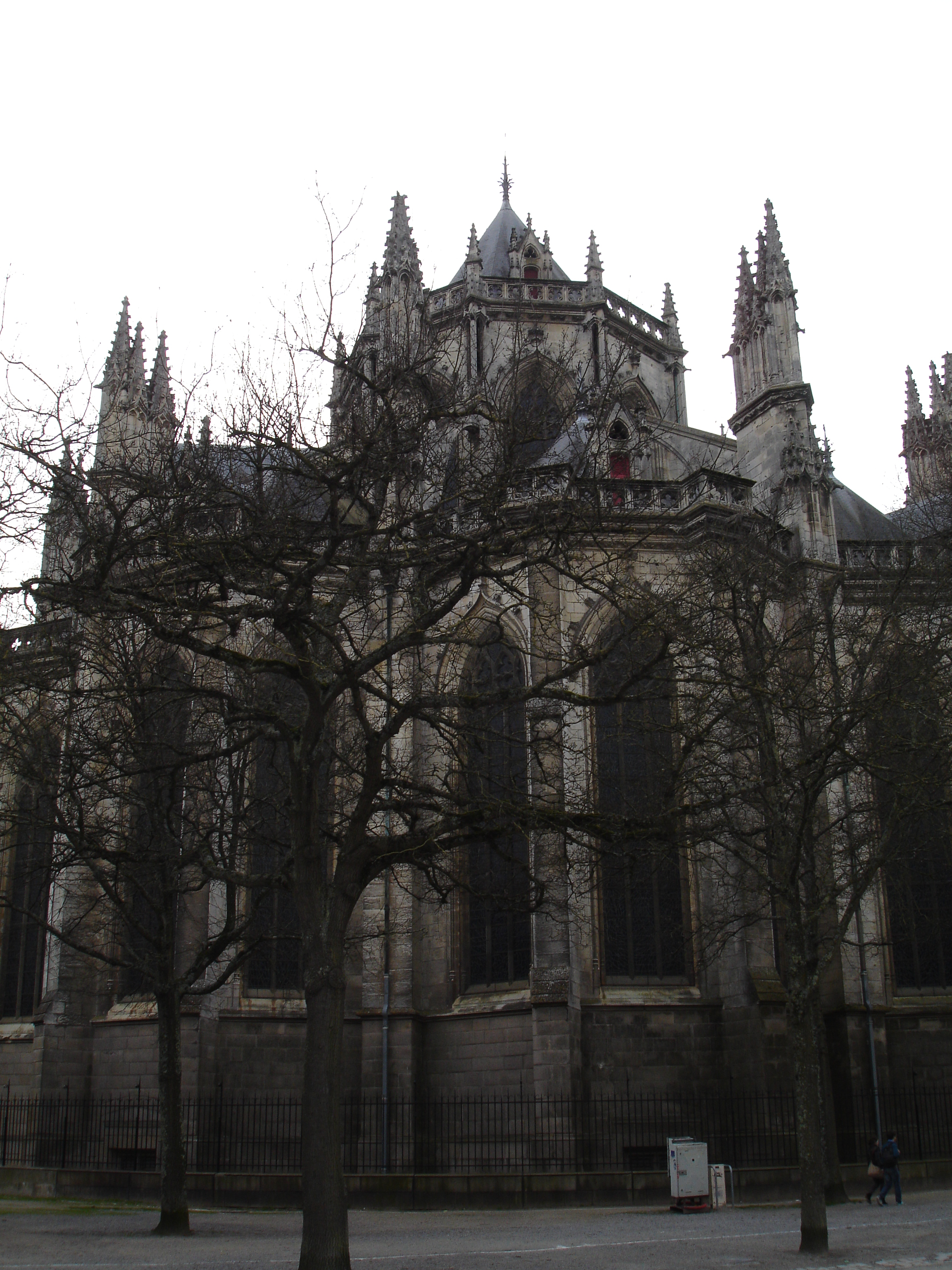 Cathédrale Saint-Pierre-et-Saint-Paul, Nantes, França